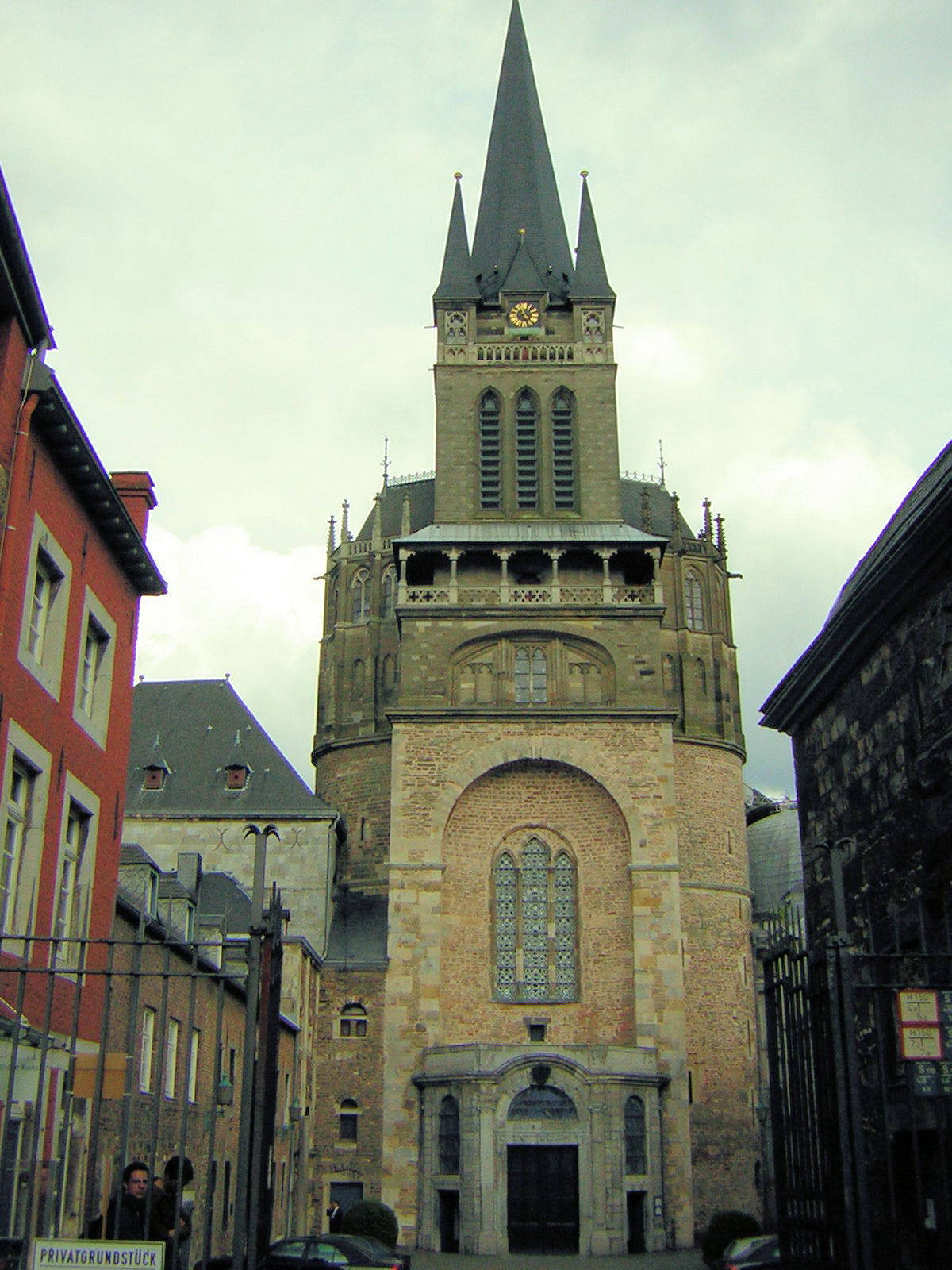 Beschreibung: Aachener Dom in Aachen Fotograf: Trexer Aufgenommen: 2005 mit Nikon Coolpix 2200